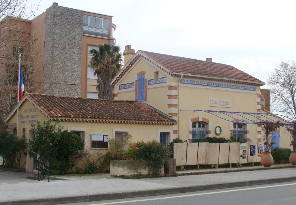 L'ancienne gare de Cavalière (commune du Lavandou), aujourd'hui bâtiment public (poste, marie annexe, poste de police).